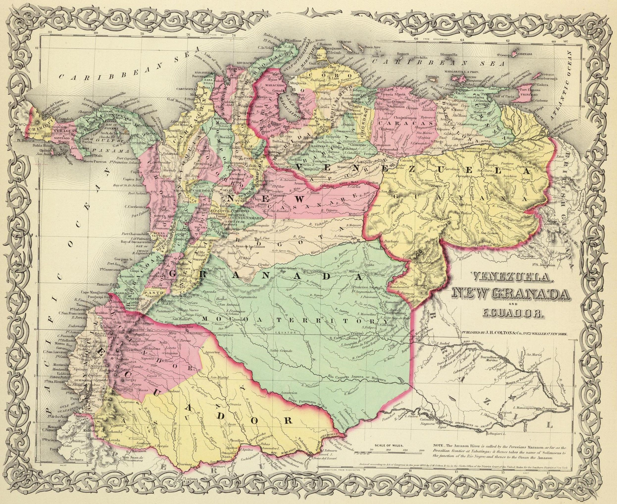 Venezuela, New Granada and Ecuador (Venezuela, Nueva Granada y Ecuador). Mapa de 1859